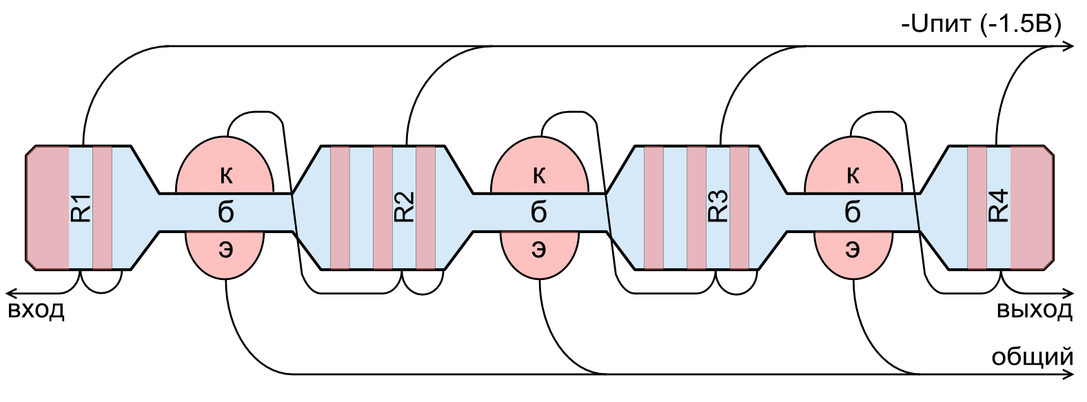 Структура интегральной схемы с изоляцией p-n-переходом, предложенная Куртом Леховцом в 1959 году (по патенту США 3029366). Cинии области - n-типа, красные - p-типа. Схема = трёхкаскадный УВЧ с непосредственными связями, напряжение питания -1.5 В. Реальная опытная структура имела 2.2 мм в длину и 0.1 мм в высоту.The first historical IC with junction isolation, by Kurt Lehovec (Sprague Electric), conceived in the end of 1958, patent filed 22/04/1959 - just a couple of months preceding Robert Noyce. The structure itself is a one-dimensional grown-crystal thing with alloyed transistors. Size: L=90 mils (2.2 mm), W=20 mils (0.5 mm), H=4 mils (0.1 mm).